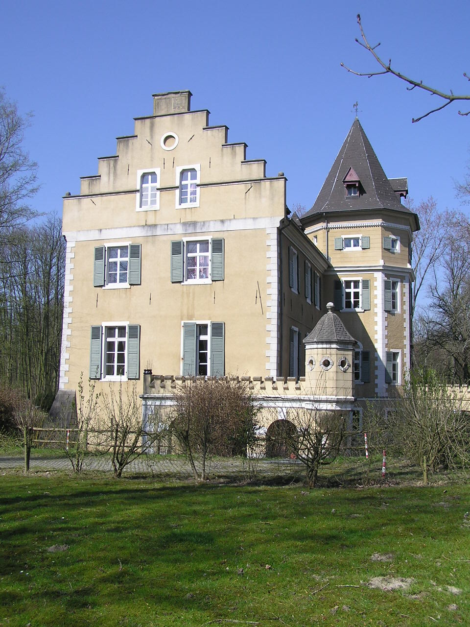 Schloss Westhusen in Dortmund-Westerfilde